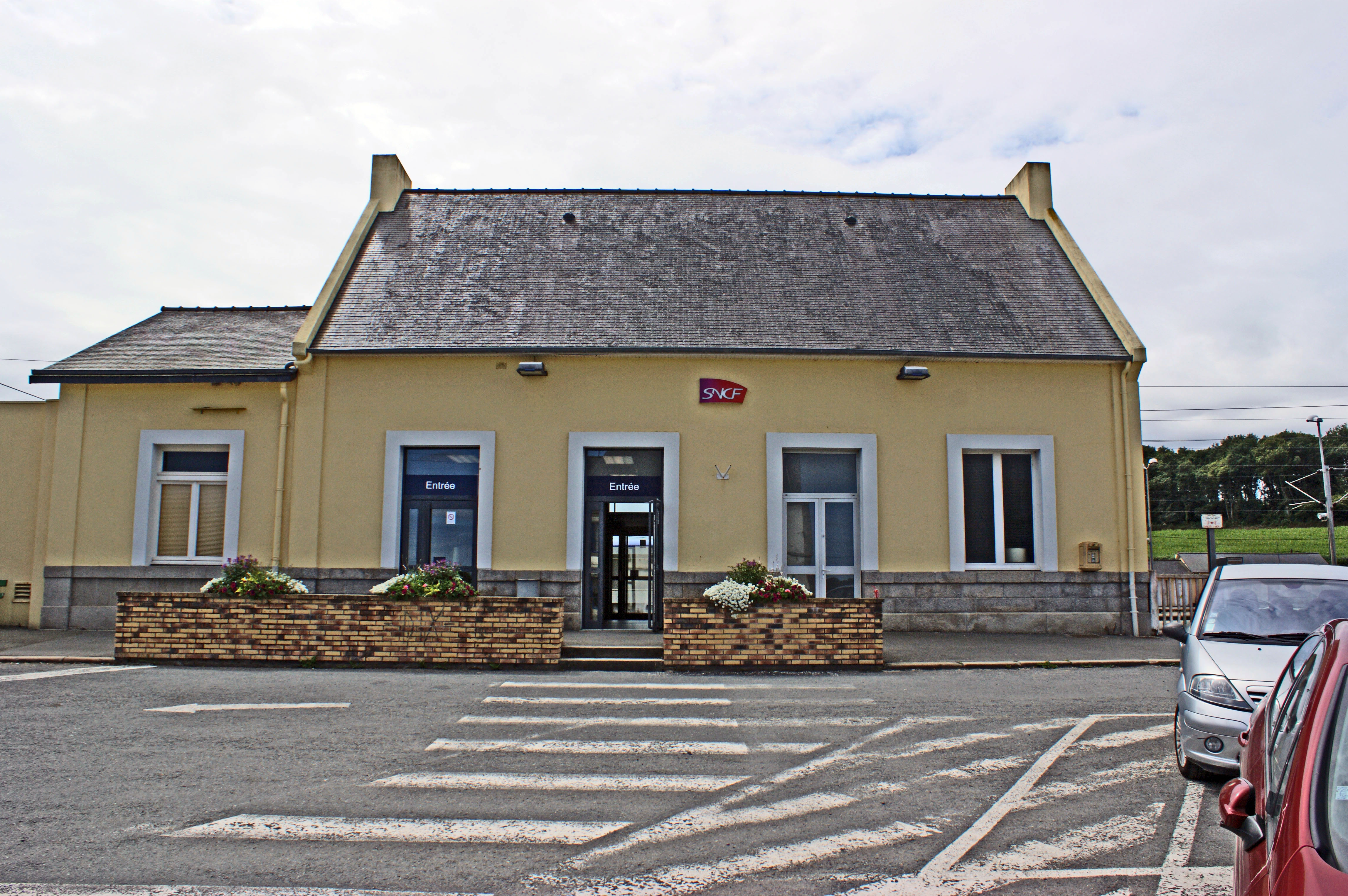 Le bâtiment voyageurs et l'entrée de la gare, vus de la place de la gare.